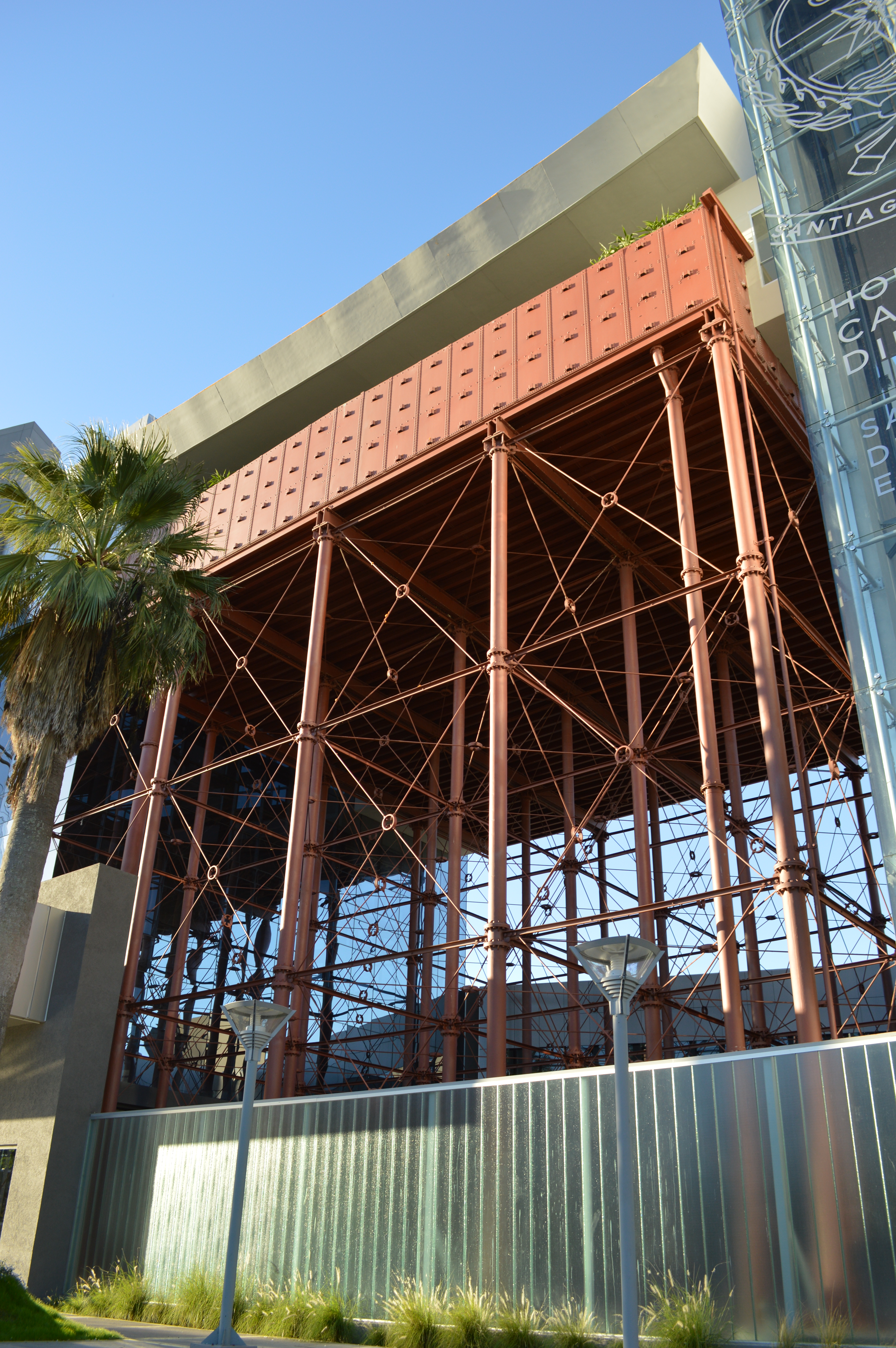 Nuevo Edificio del Poder Legislativo de la Provincia de Santiago del Estero, Argentina. Detalle del tanque restaurado.